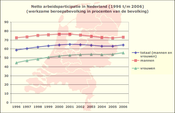 Netto arbeidsparticipatie in Nederland in de periode 1996 t/m 2006 (mannen, vrouwen en totaal)